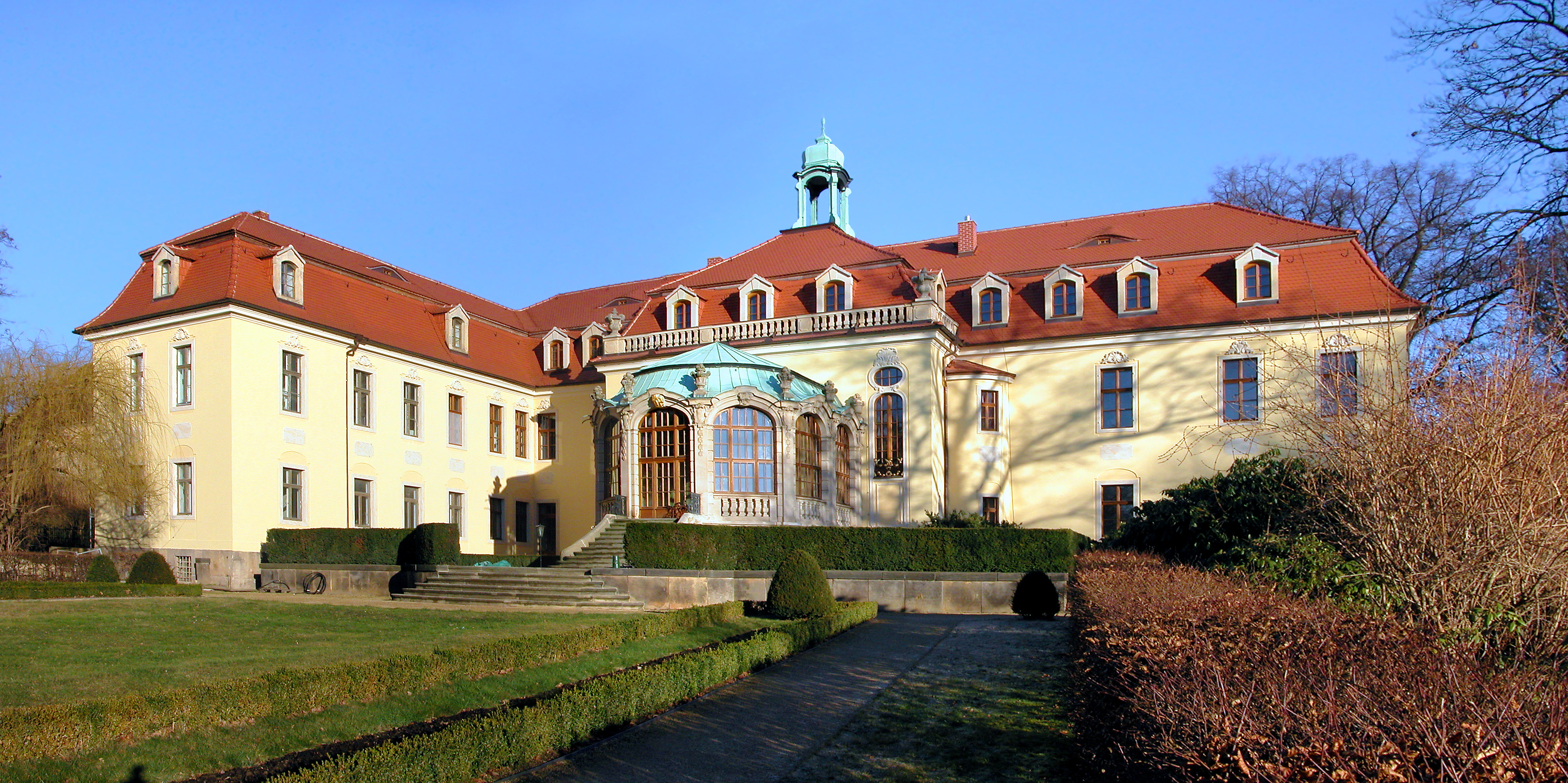 16.01.2005 01662 Proschwitz, Heiliger Grund 2 (GMP: 51.179249,13.475305): Schloß Proschwitz, ein Barockbau von 1732, westlicher Anbau 1832, ist Sachsens ältestes noch existierendes Weingut. Ursprünglich gehörten die Proschwitzer Weinberge dem Meißner Bischof. Ab 1997 Weingut von Dr. Georg Prinz zur Lippe. [DSCN5836-5837.TIF]20050116850MDR.JPG(c)Blobelt